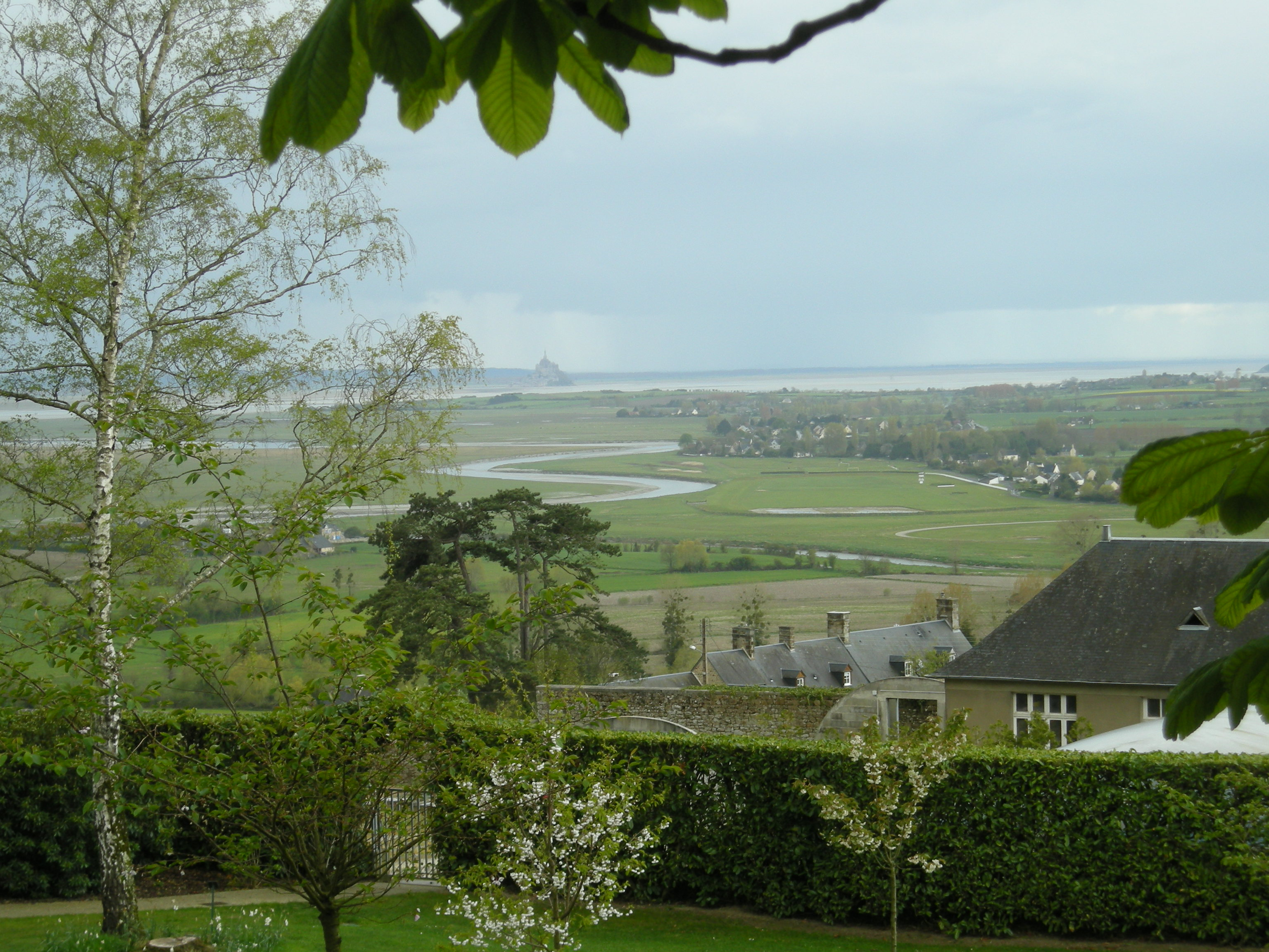 Vue sur la Sée et le Mont Saint-Michel, depuis le Jardin des Plantes d'Avranches (Normandie)